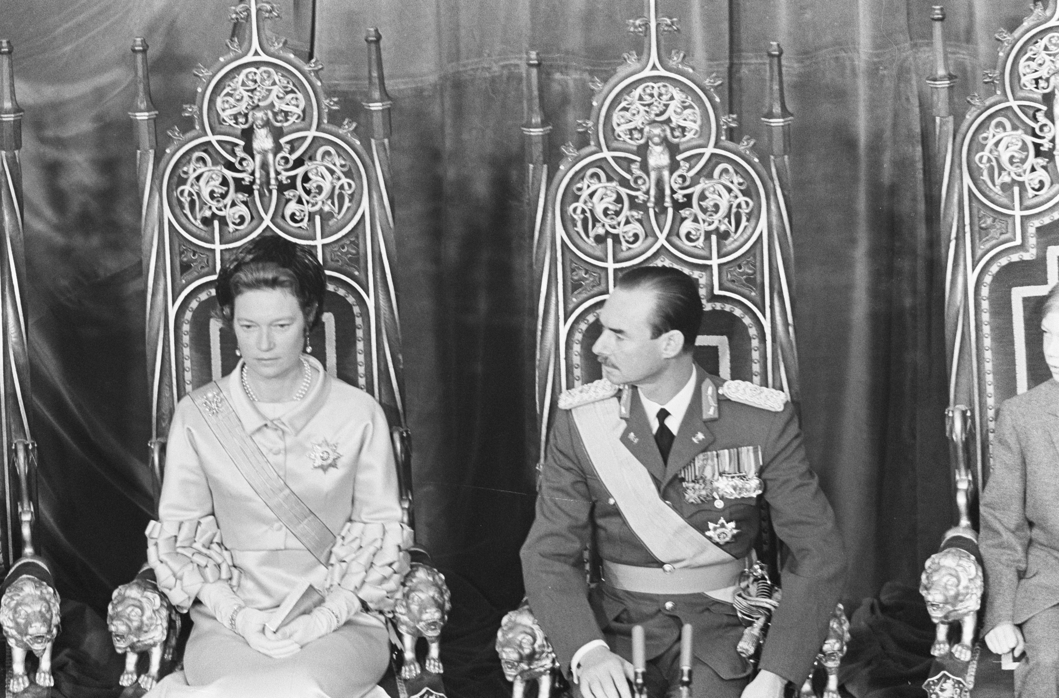 Collectie / Archief : Fotocollectie Anefo Reportage / Serie : [ onbekend ] Beschrijving : De troonwisseling in Luxemburg, de Hertogelijke familie Datum : 12 november 1964 Locatie : Luxemburg Trefwoorden : families, troonwisselingen Fotograaf : Nijs, Jac. de / Anefo Auteursrechthebbende : Nationaal Archief Materiaalsoort : Negatief (zwart/wit) Nummer archiefinventaris : bekijk toegang 2.24.01.05 Bestanddeelnummer : 917-1197